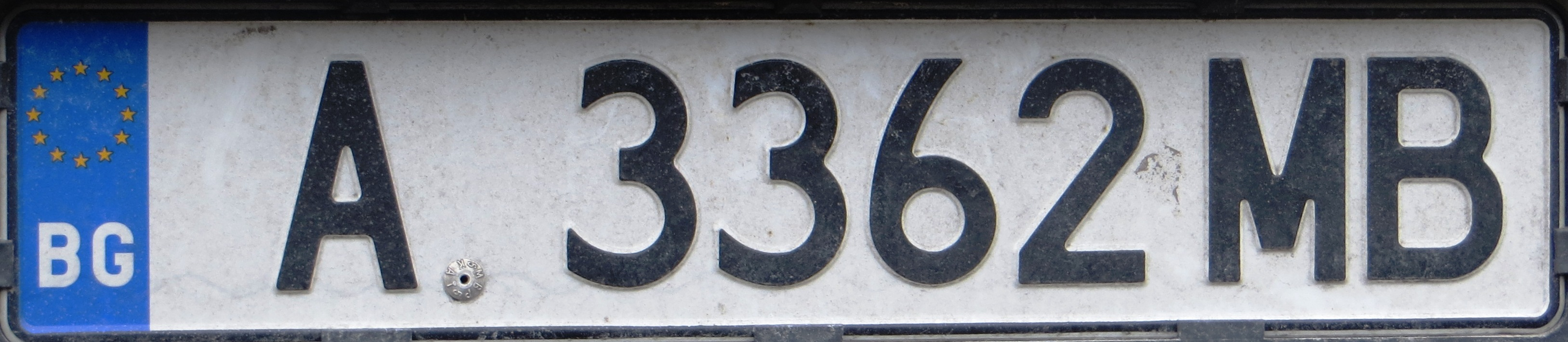 Bulgaarse kentekenplaat